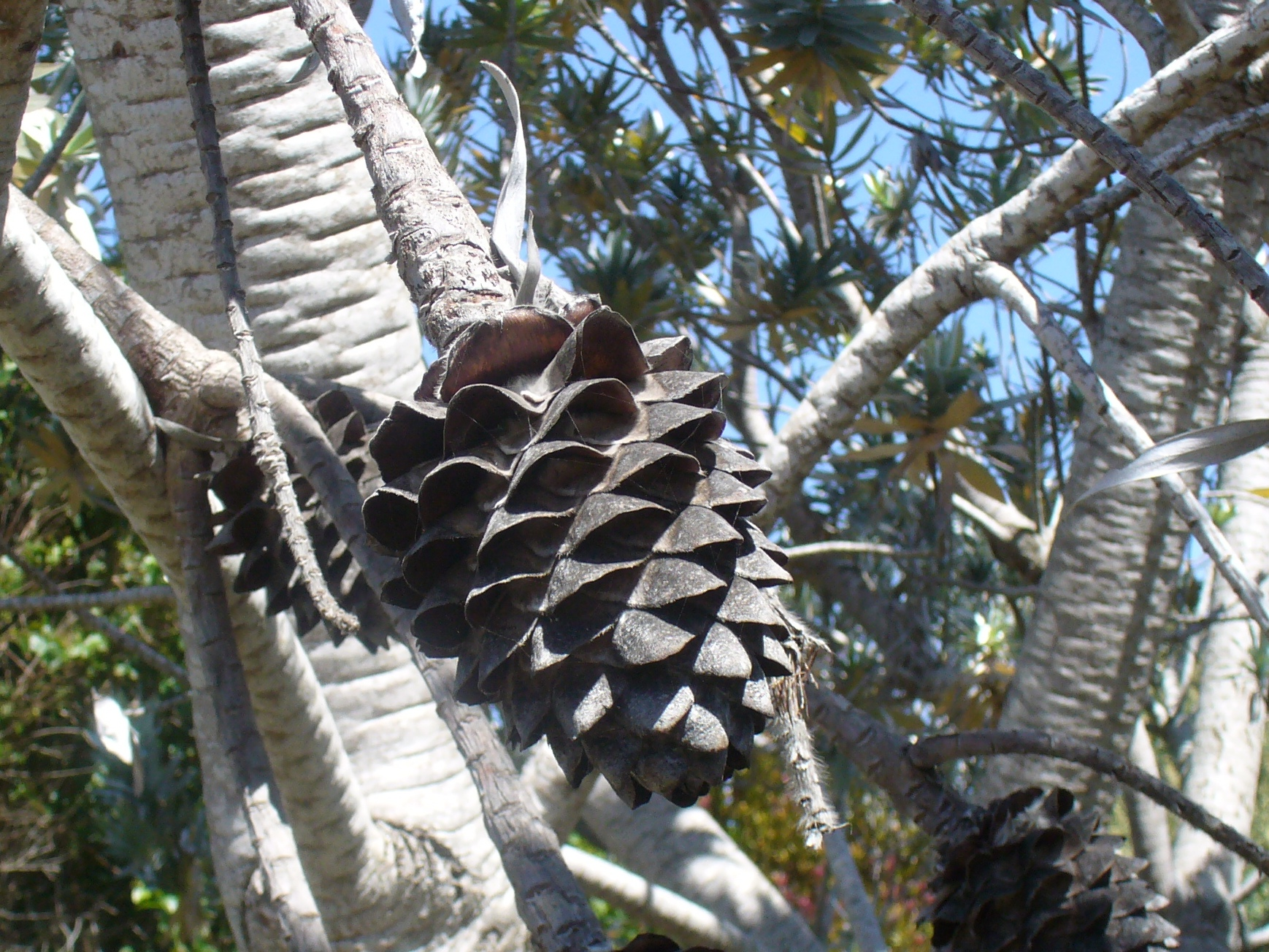 Female silver tree cone (Leucadendron argenteum)